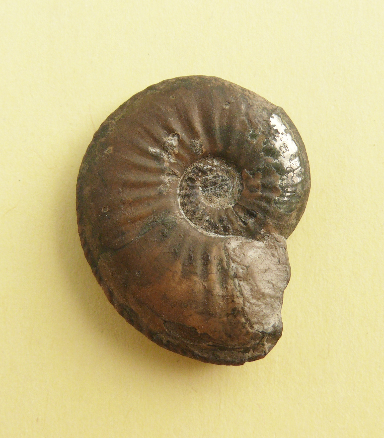 Amaltheus sp., Amaltheenton-Formation, Unterer Jura Schwäbische Alb, Germany